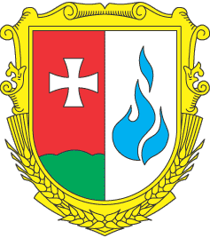 Затверджений 23 січня 2001р. рiшенням сесії районної ради. Щит розтятий, у першому червоному полі срібний лапчастий хрест над зеленою базою (луками); у другому срібному полі - синє полум'я. Щит вписано у декоративний картуш, доповнений знизу золотими колосками пшениці. Барви пов'язані з колористикою герба районного центру - селища Локач. Срібний хрест у червоному полі підкреслює знаходження району на Волині, а зелені луки - символ родючості та добробуту. Сині язики полум'я вказують на велике газове родовище, віднайдене на території району. Автор - І.Хамежук. Комп'ютерна графіка - В.М.Напиткін.